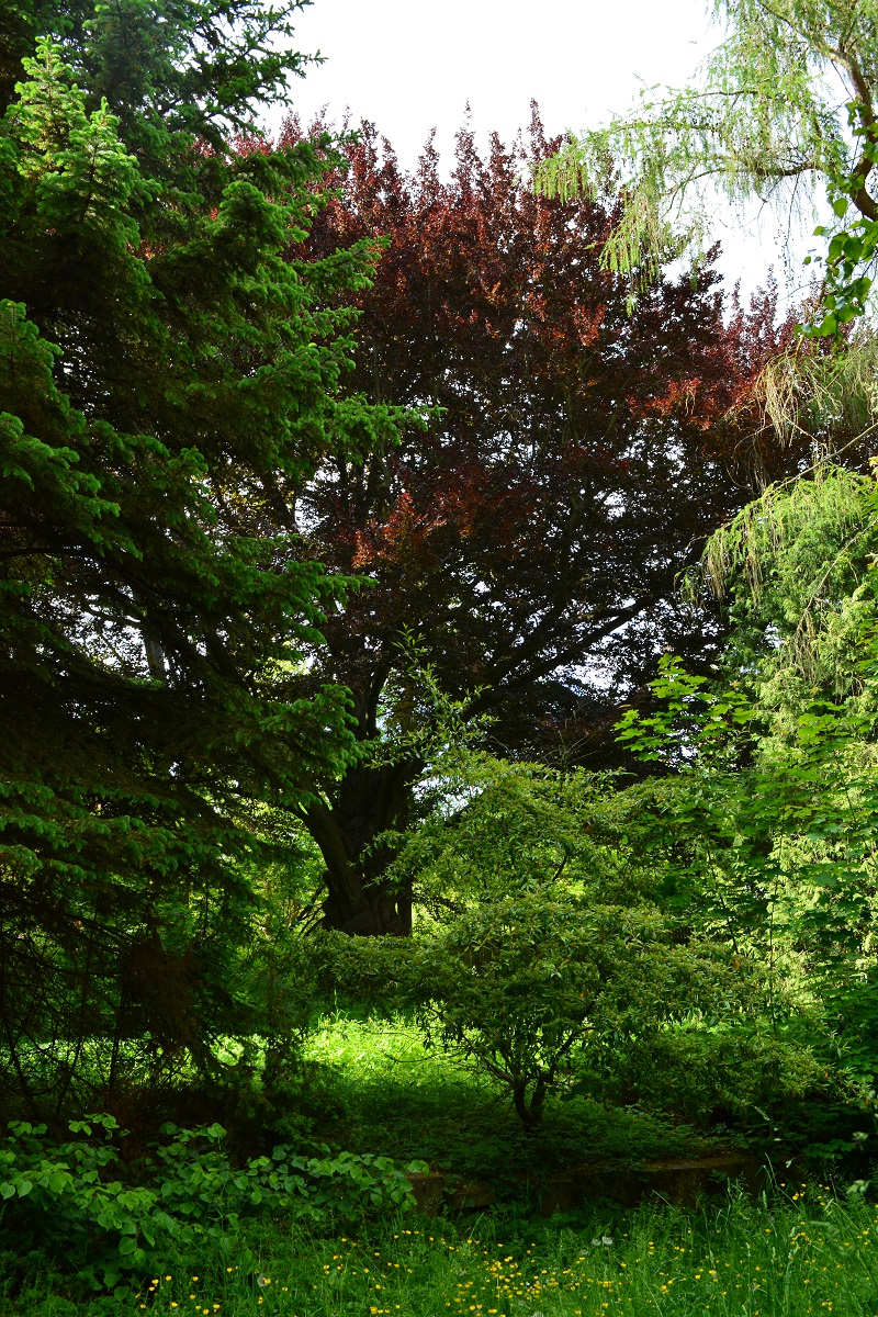 Blick auf die Rotbuche im Schlosspark der Gemeinde Weberstedt am Nationalpark Hainich